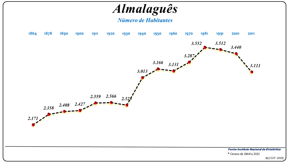 População